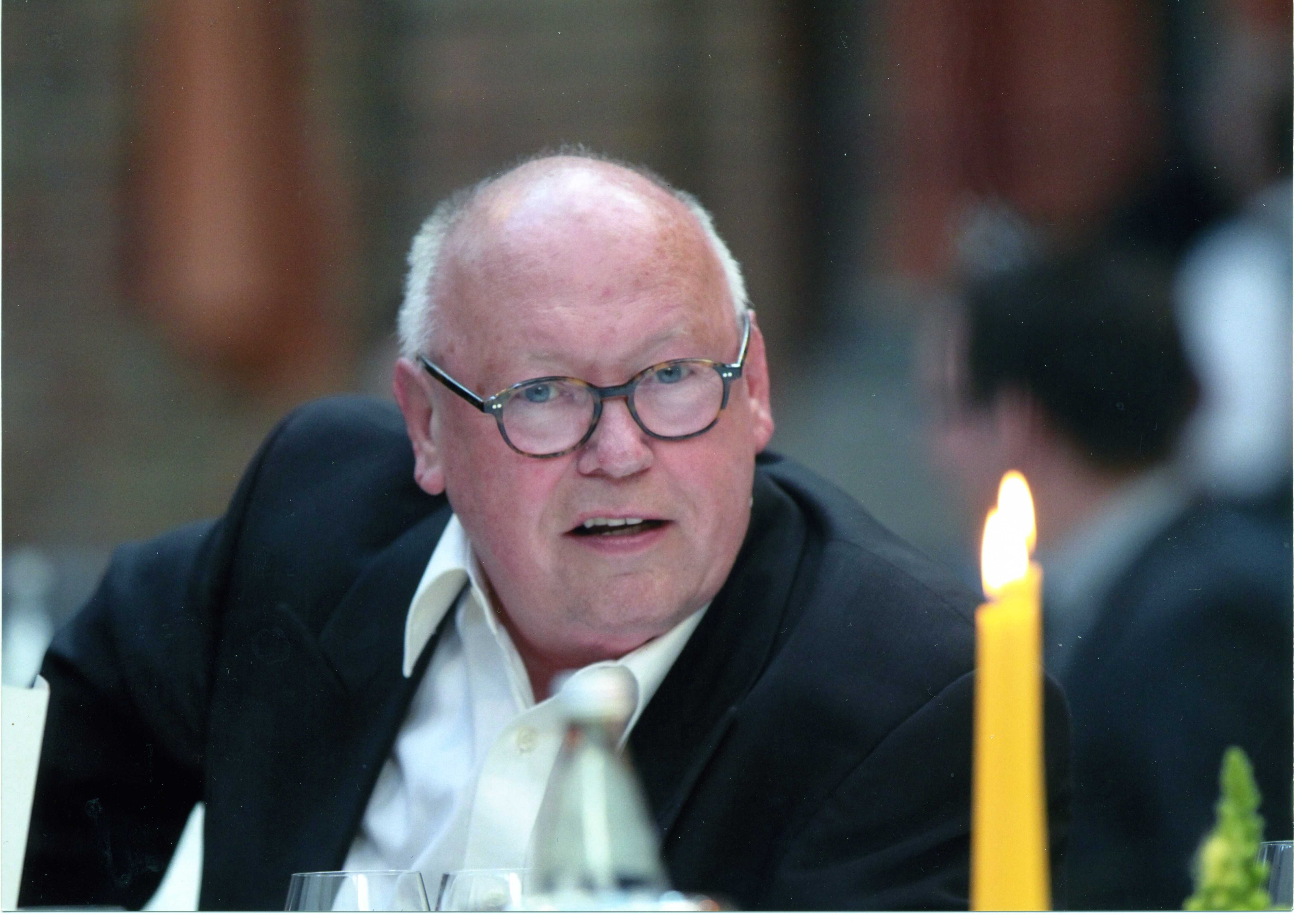 Porträtfotografie von Prof. Dr. Georg-Michael Fleischer